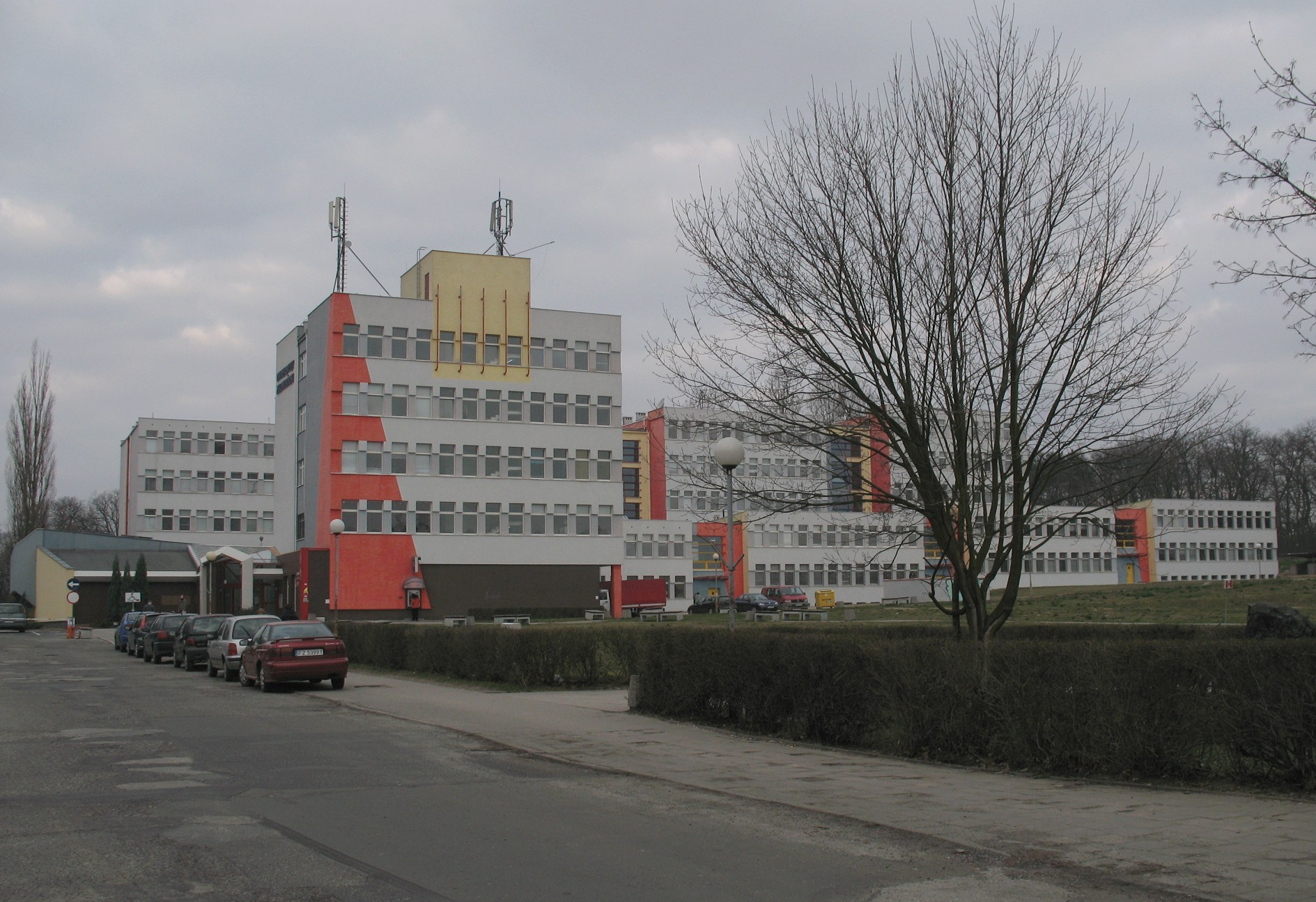 Budynki Campusu B Uniwersytetu Zielonogórskiego; dawniej: teren WSP w Zielonej Górze autor: Mohylek 15:10, 20 March 2007 (UTC)